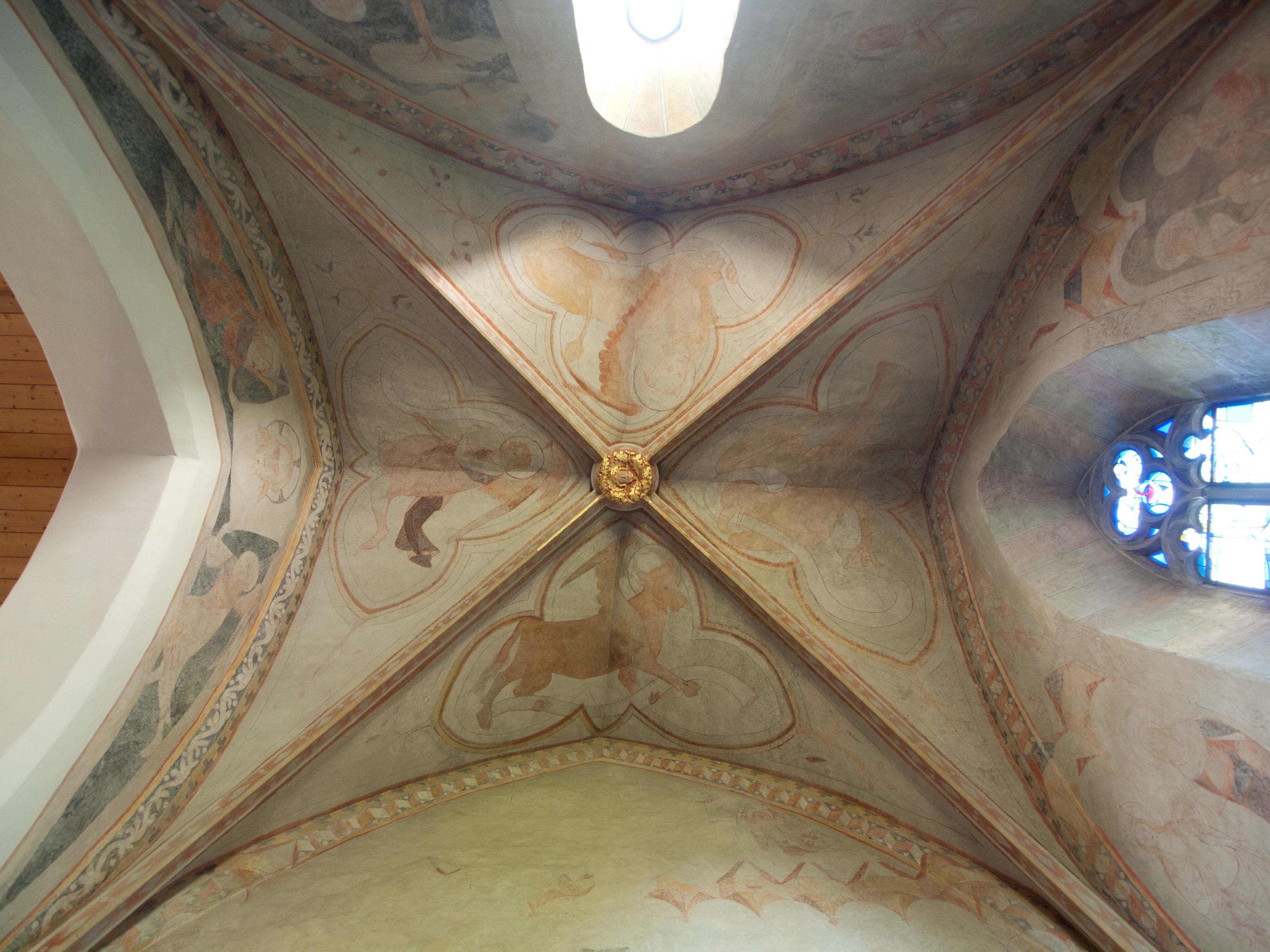 Die Reformierte Kirche von Windisch (gebaut um 1300) Deckengemälde im Chor